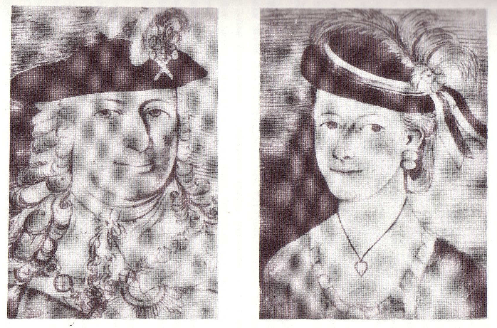 Zeichnungen nach Ölgemälden von Graf Heinrich von Keyserling und Gräfin Caroline Amalie von Keyserling (unbekannter Maler, wiedergegeben in Hermann Güttler: Königsbergs Musikkultur im 18. Jahrhundert. Königsberg 1925)